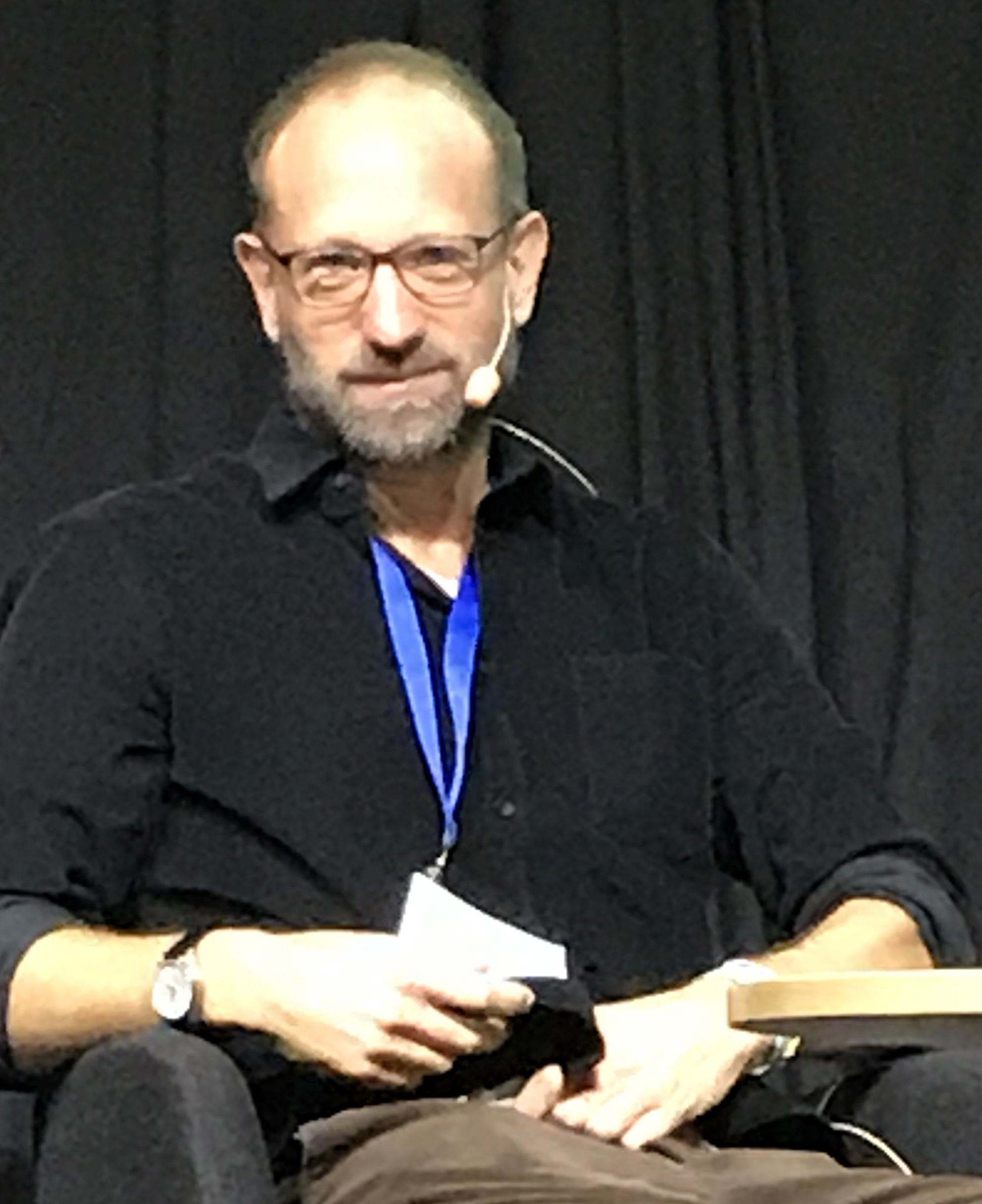 Christian Unge, på Bokmässan i Göteborg 2019